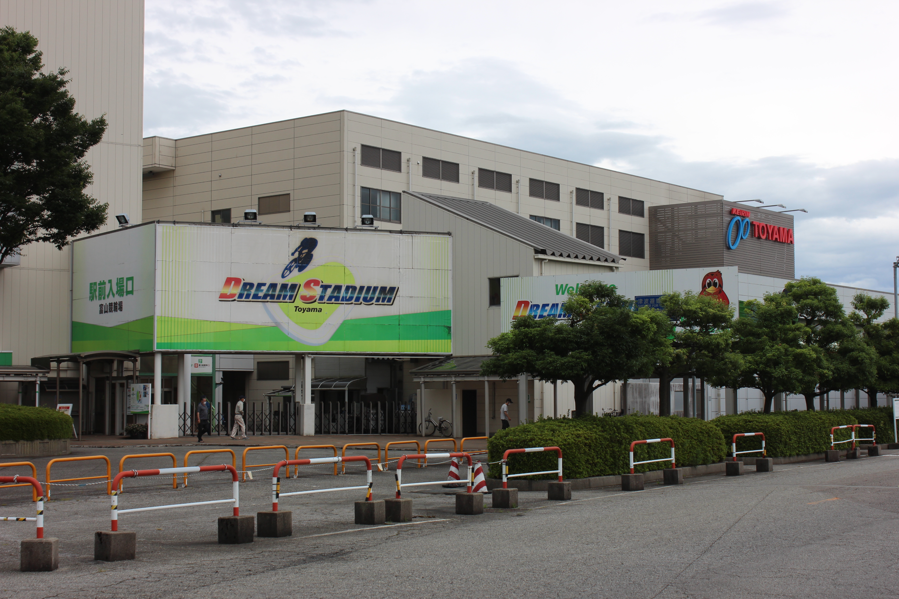 富山競輪場、競輪場前駅より撮影